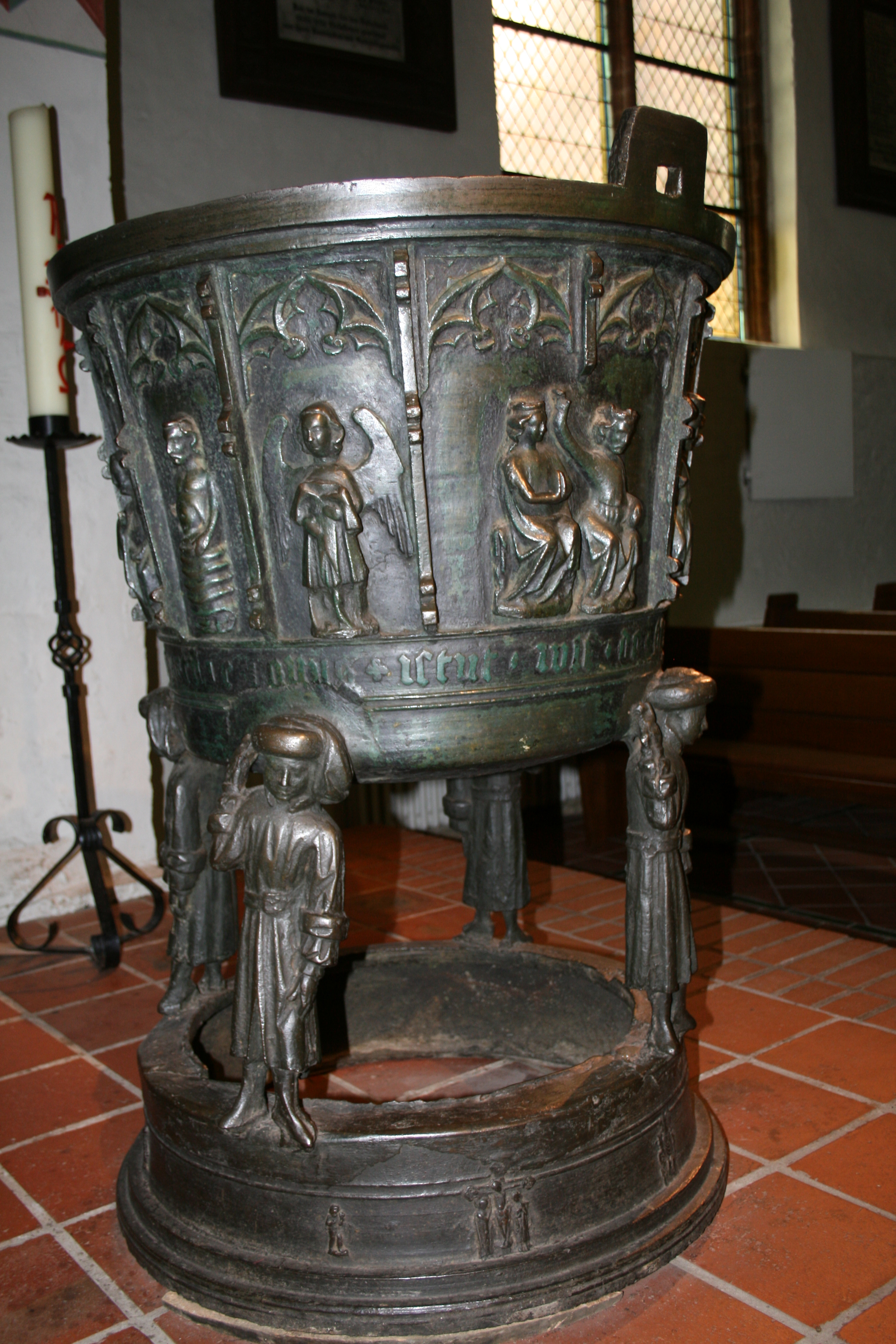 gotisches Taufbecken